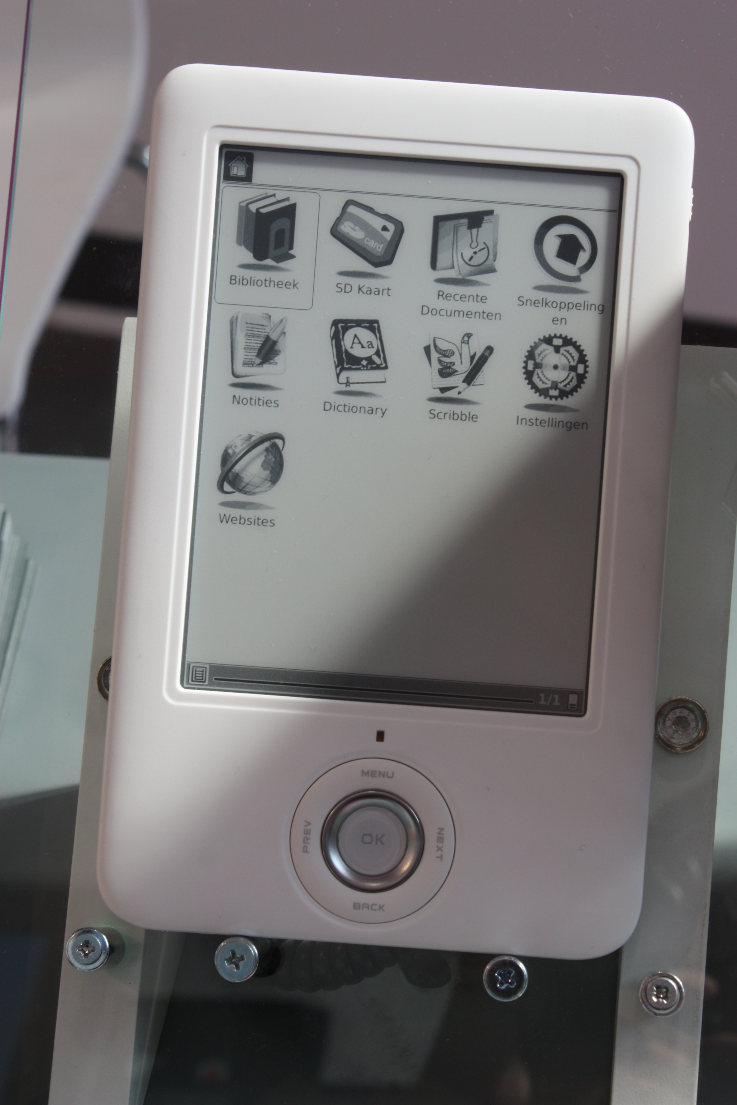 IFA 2010, Berlin